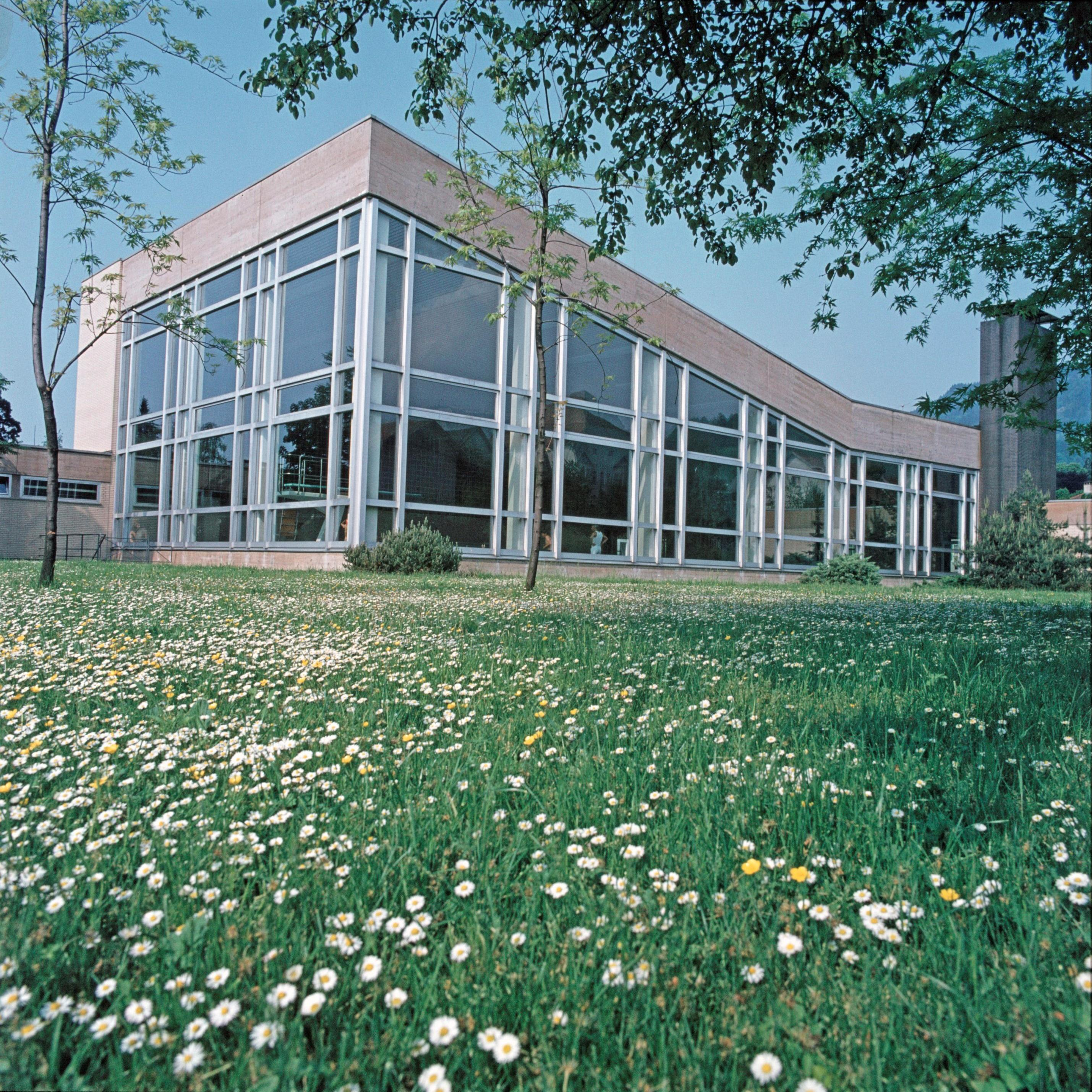 Das Dornbirner Hallenbad (heute Stadtbad Dornbirn) im Frühling 1974 von außen.